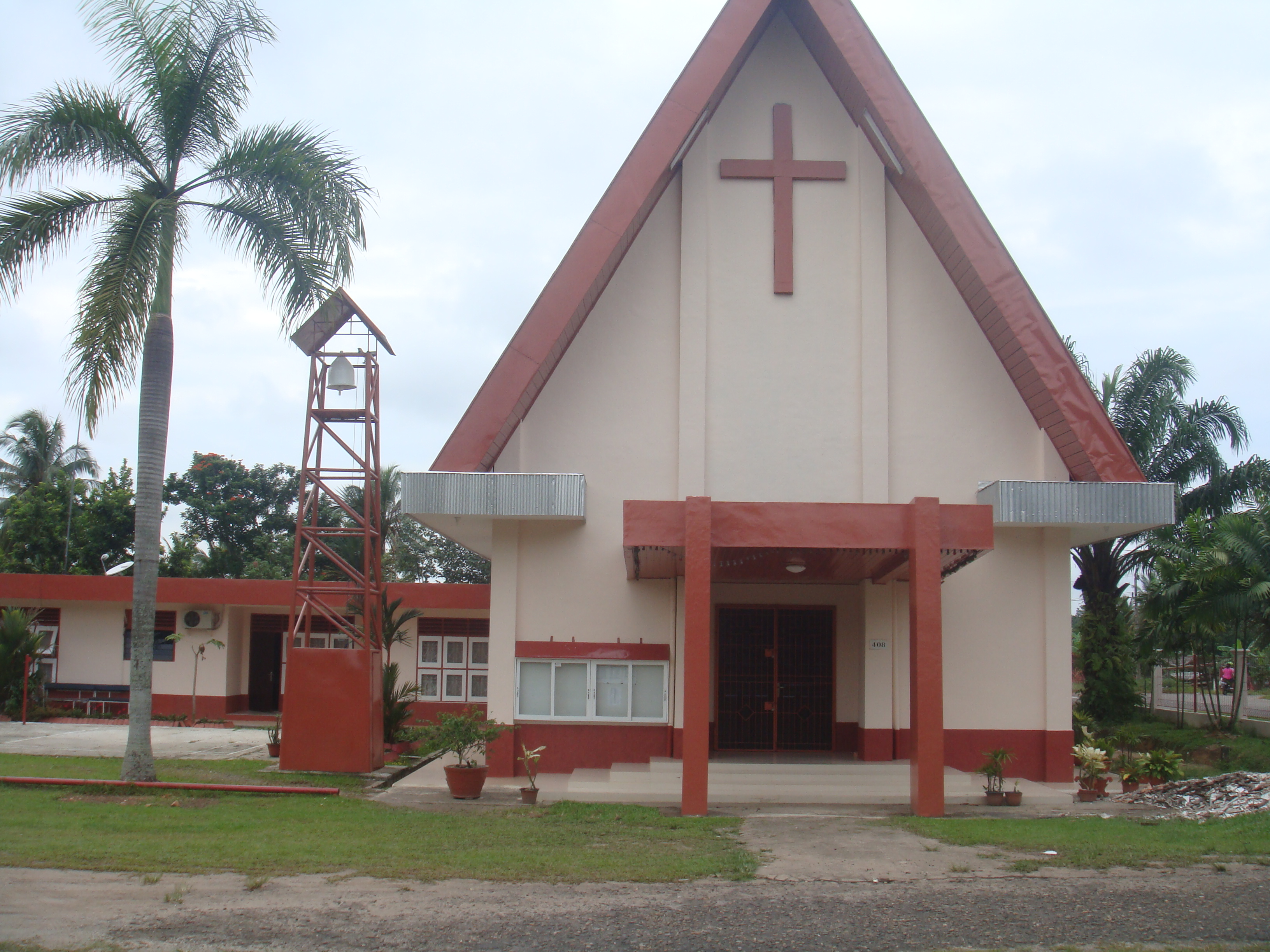 Gereja Oikoumene di Kompleks PT. Pertamina, Prabumulih